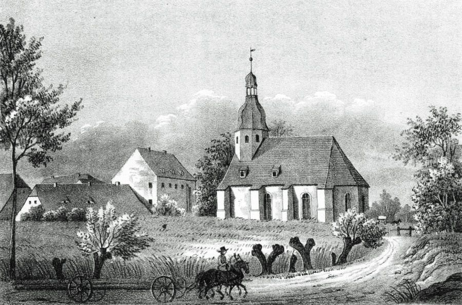 Die Auenkirche in Markkleeberg um 1840